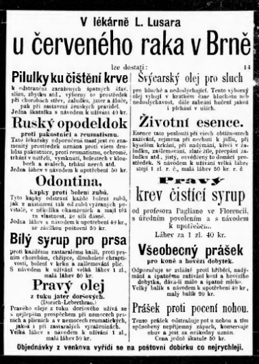 Doborá reklama na Opodeldok